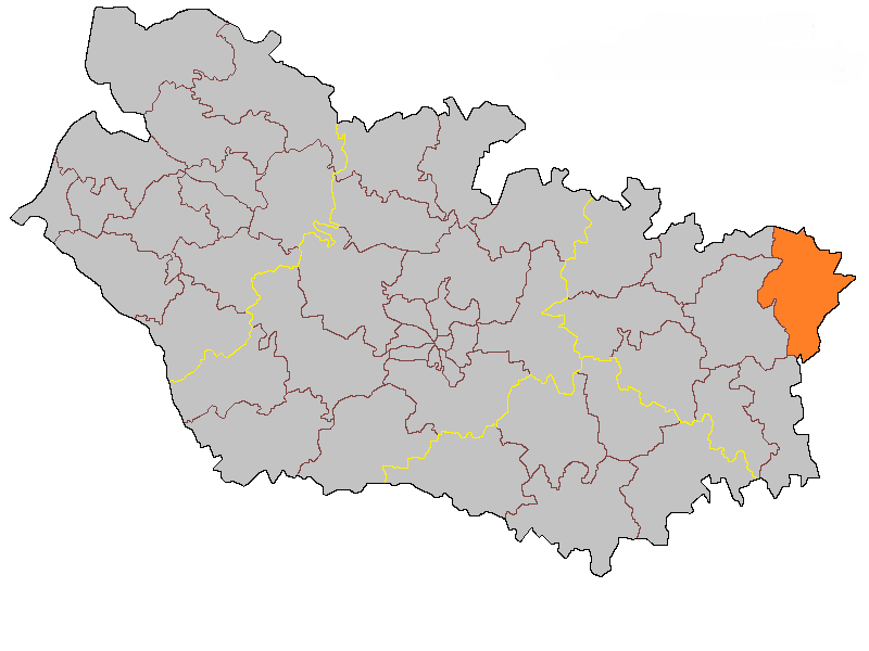 Кантон Руазель на карте департамента Сомма